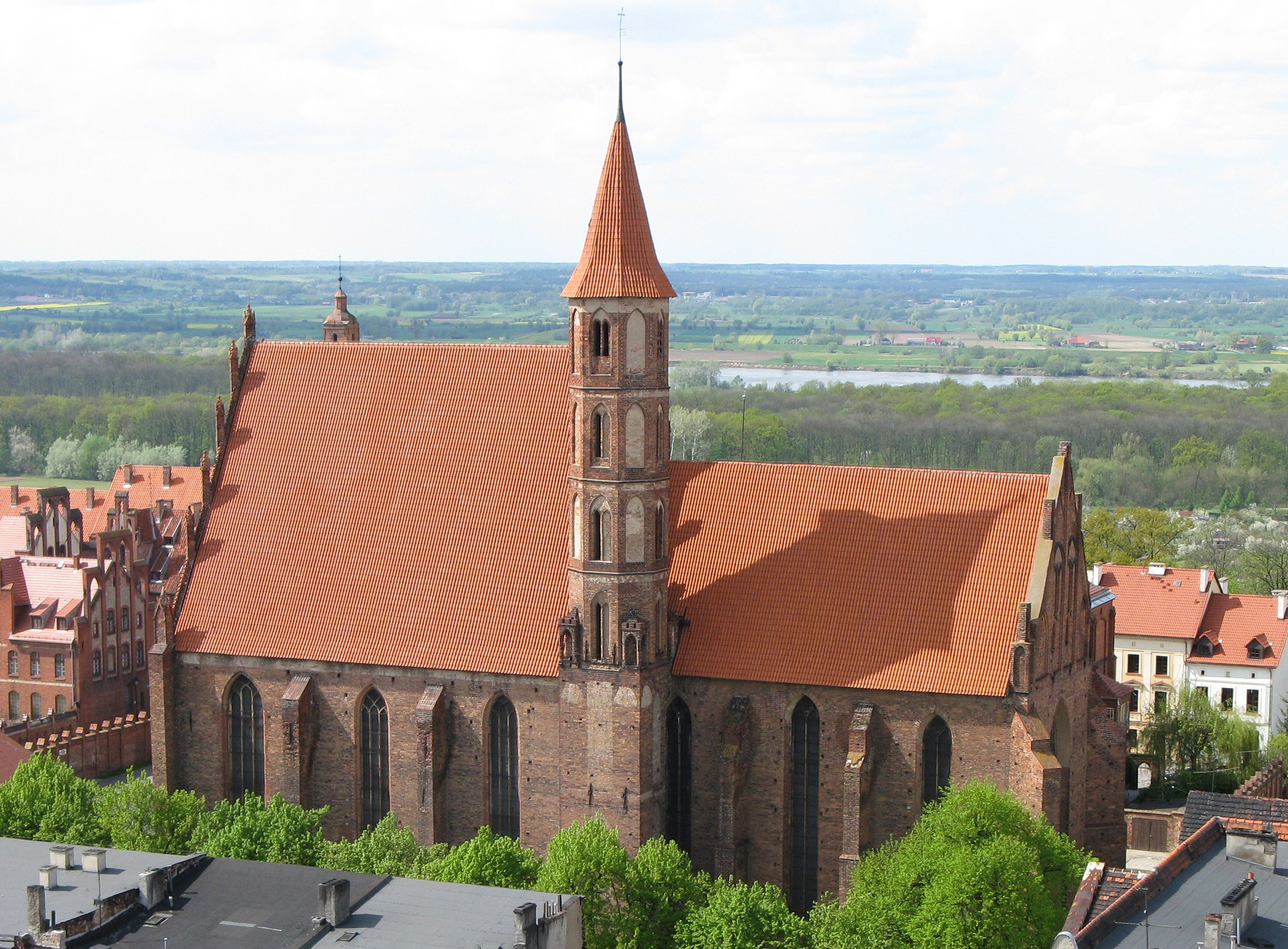 Kościół św. Jakuba i św. Mikołaja w Chełmnie